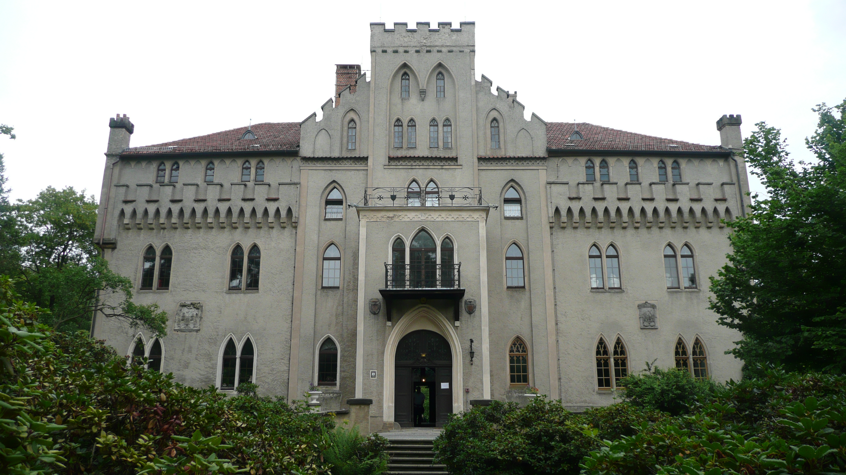 Schloss Seifersdorf in Sachsen